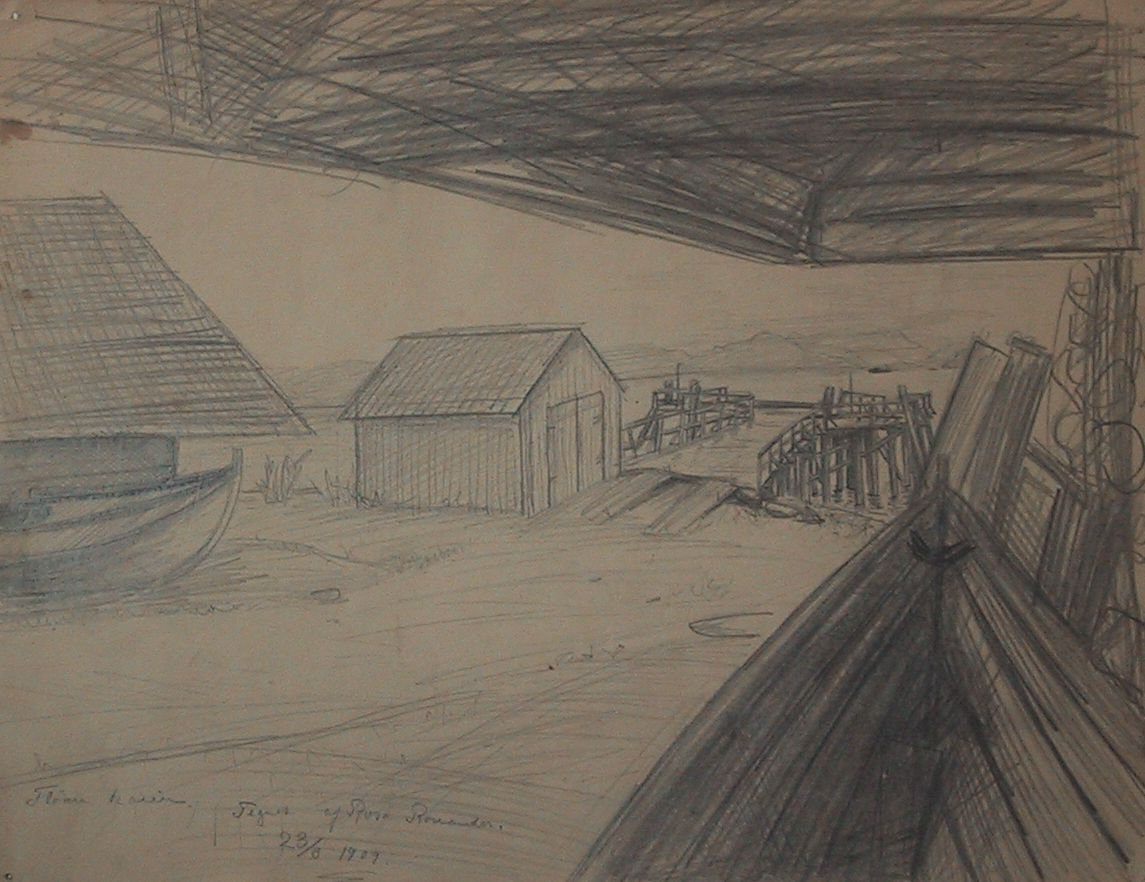 Victor Ronanders fremstilling av kaien og naustene ved Fløan på Skatval. Blyantskisse, 32,5 x 25 cm.